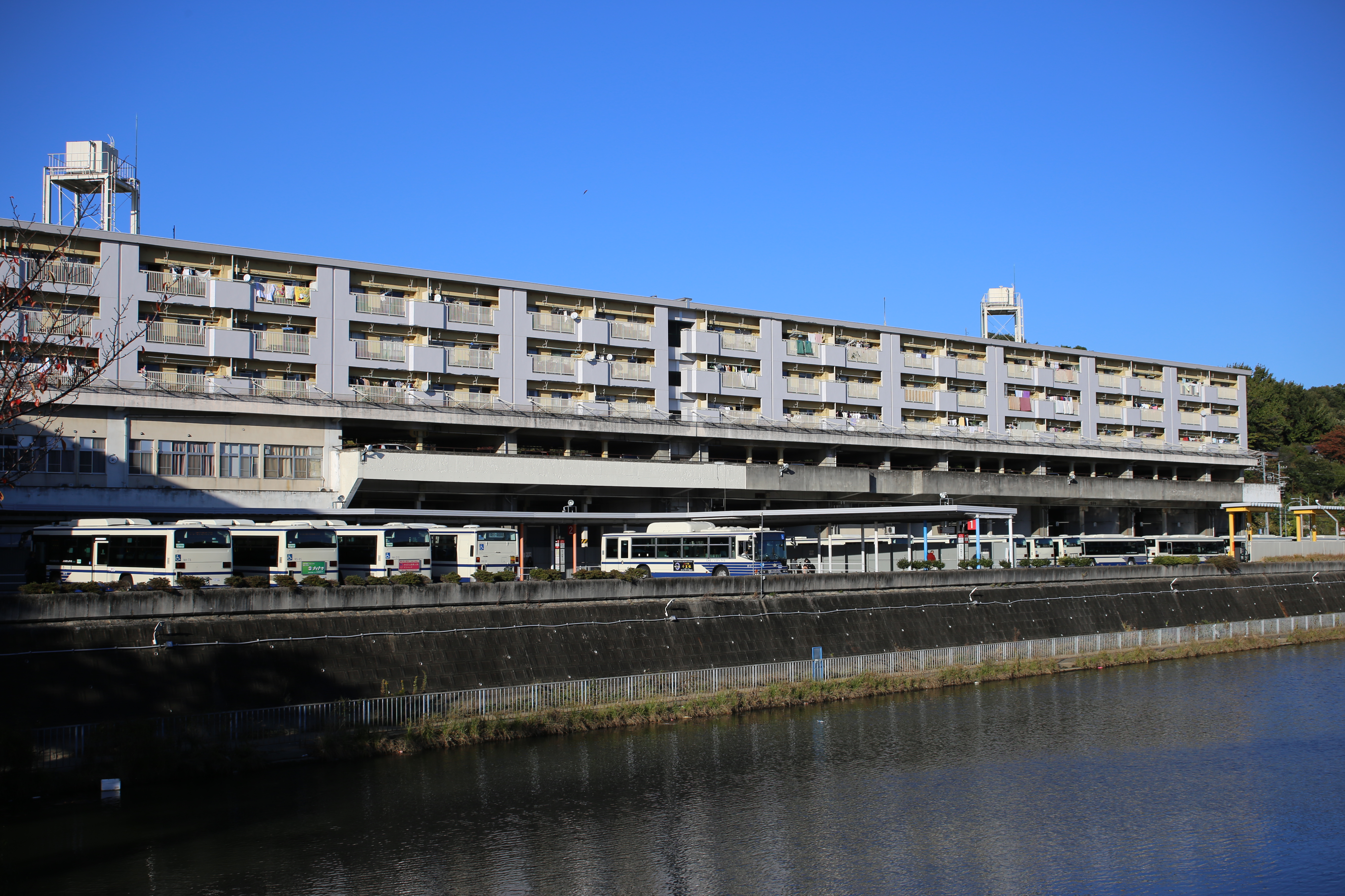 名古屋市天白区相川一丁目の名古屋市営南相生荘を西側公道南側より撮影